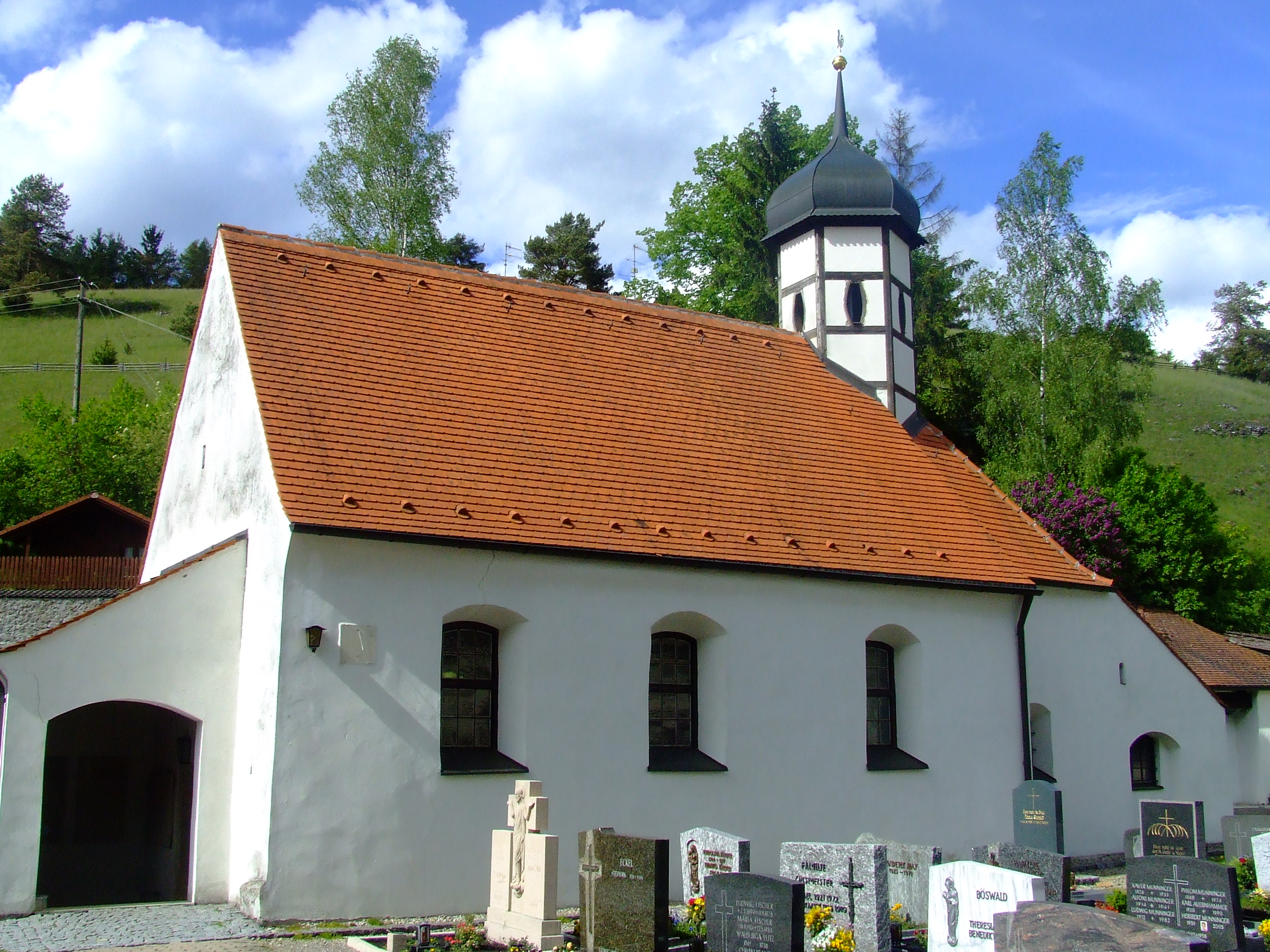 Die kleine Kirche von Mühlheim, einem Ort im oberbayerischen Markt Mörnsheim, Kreis Eichstätt, vermutlich karolingischen Ursprungs.